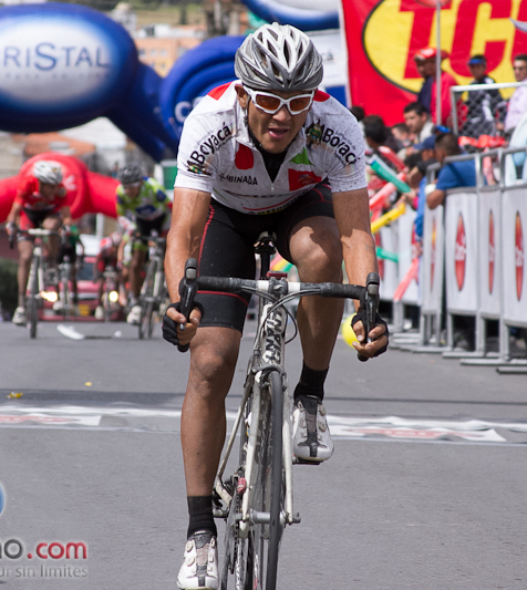 Alex Cano8ª eta. Clásico RCN 2012 6 de octubre de 2012 Zipaquirá - Tunja 163,6 Km